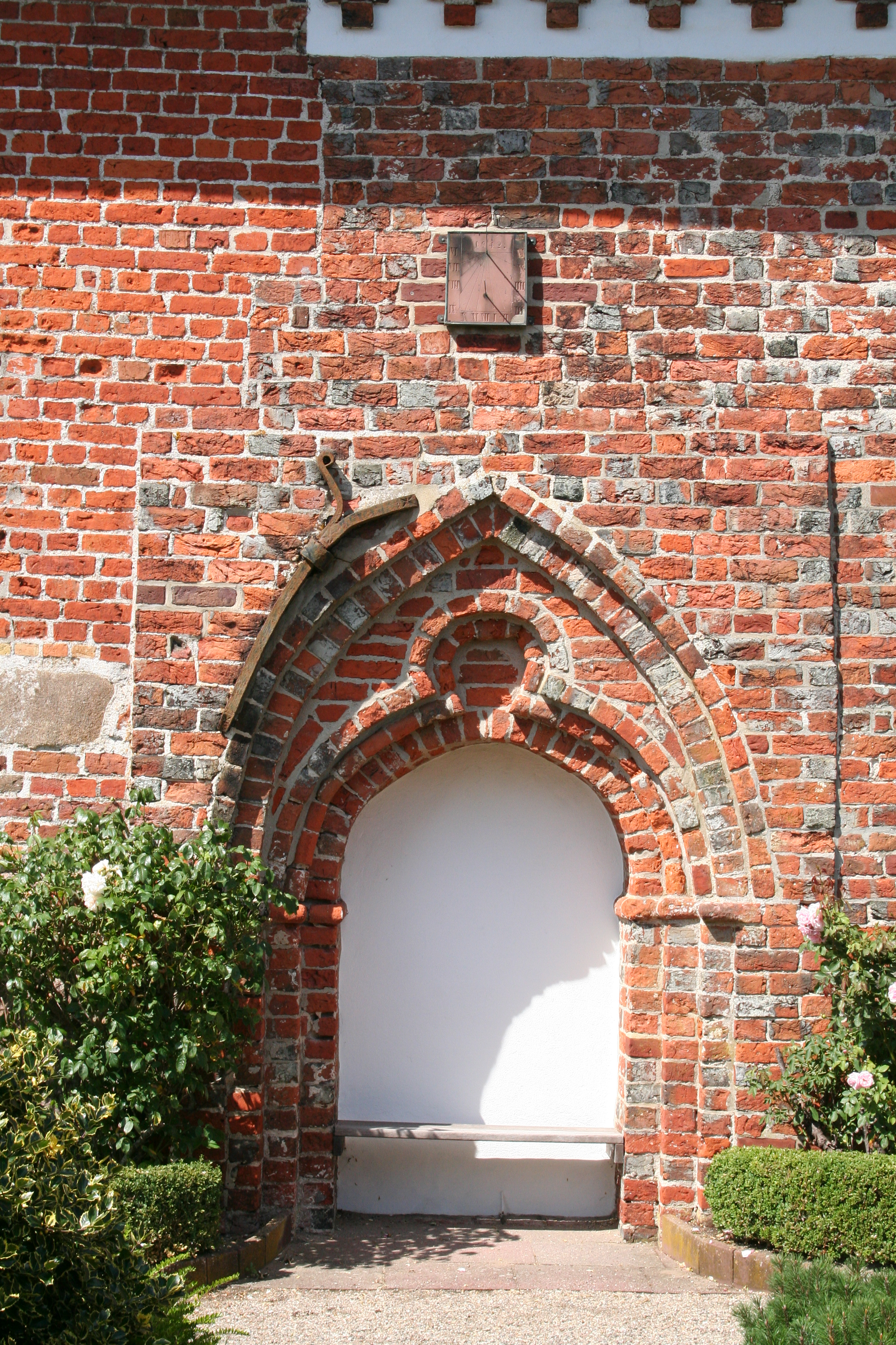 Kirchlein am Meer, Schobüll, Husum (von Süden) This is a photograph of an architectural monument.